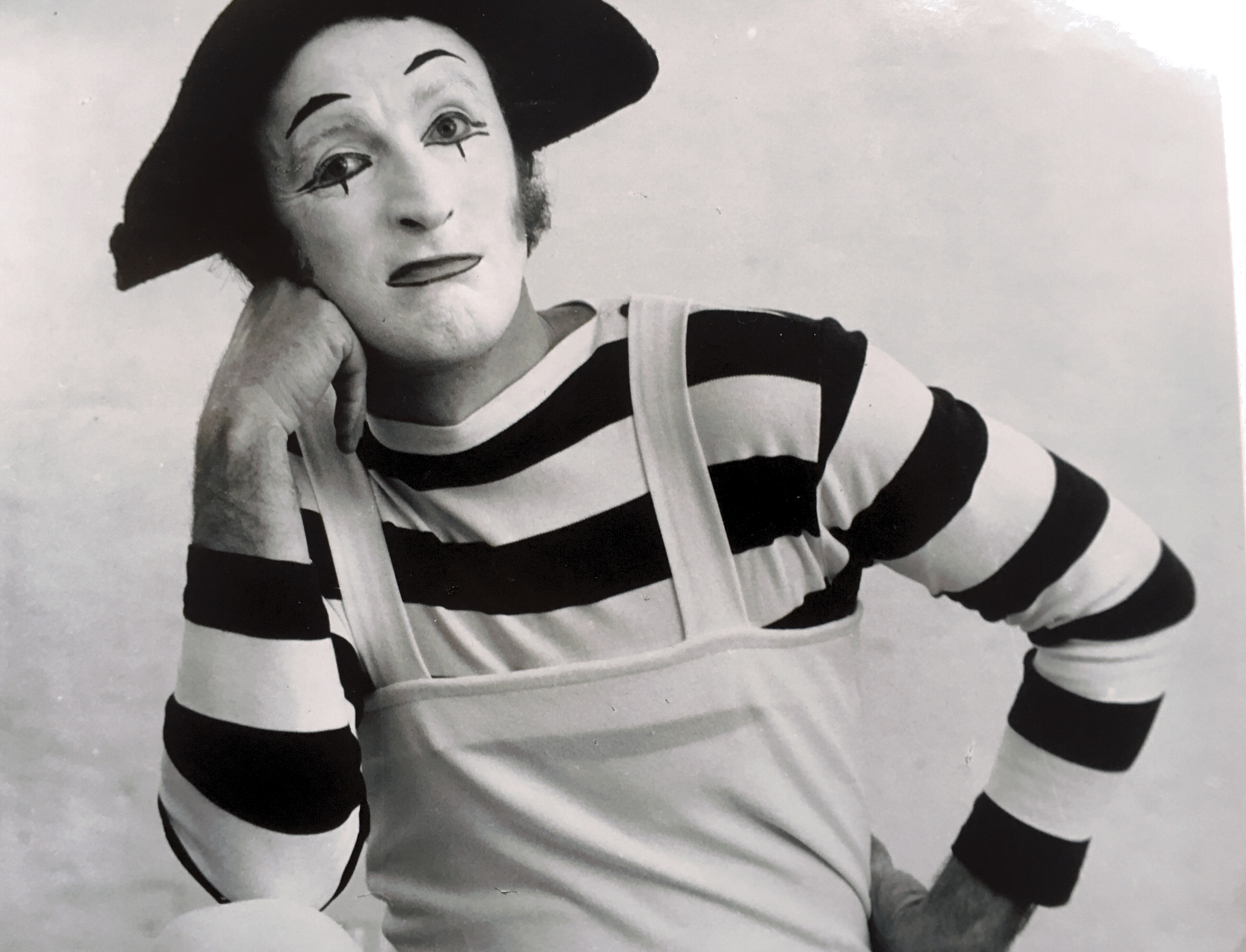 Eberhard Kube als "QB"